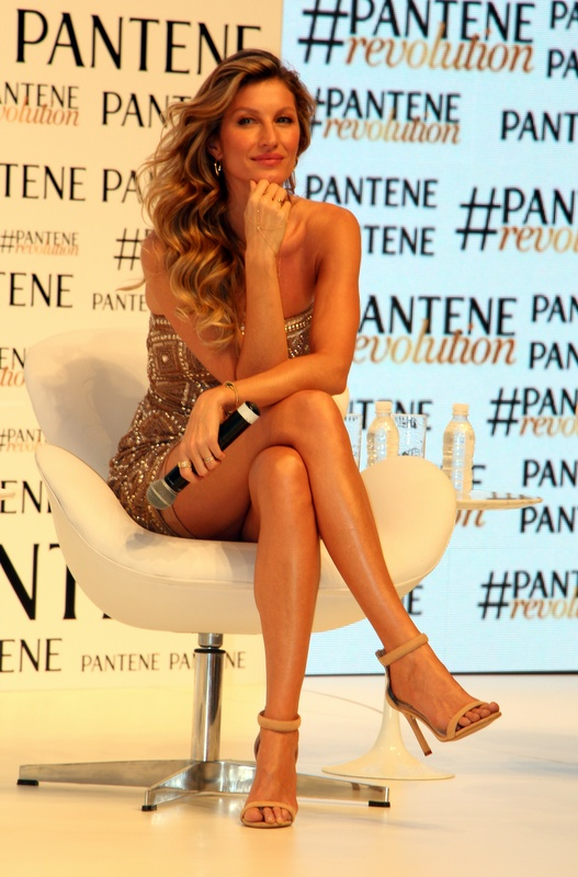 Gisele Bundchen-012